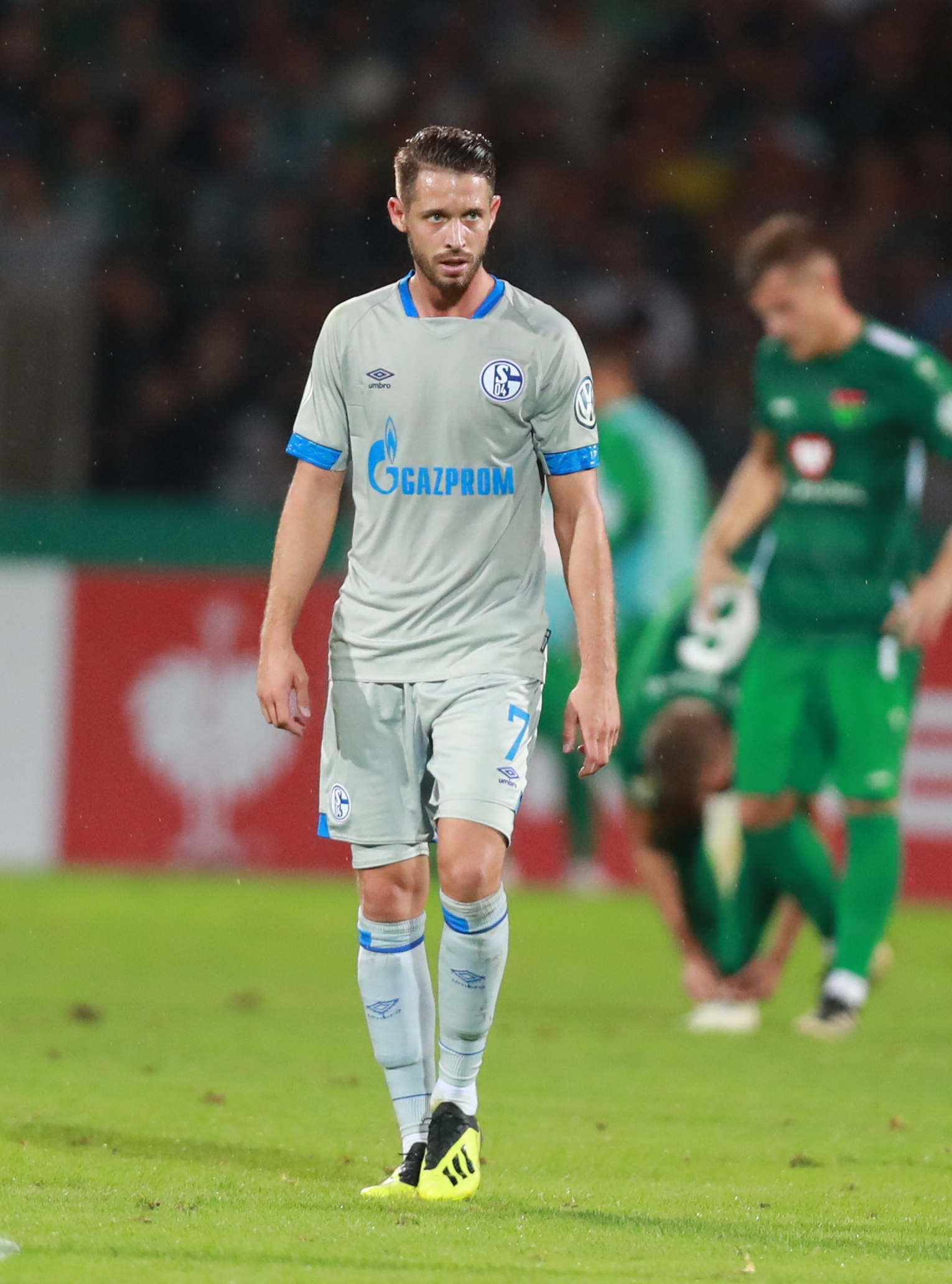 DFB-Pokal 2018/19, 1. Hauptrunde: 1. FC Schweinfurt 05 gegen FC Schalke 04 0:2 (0:1)